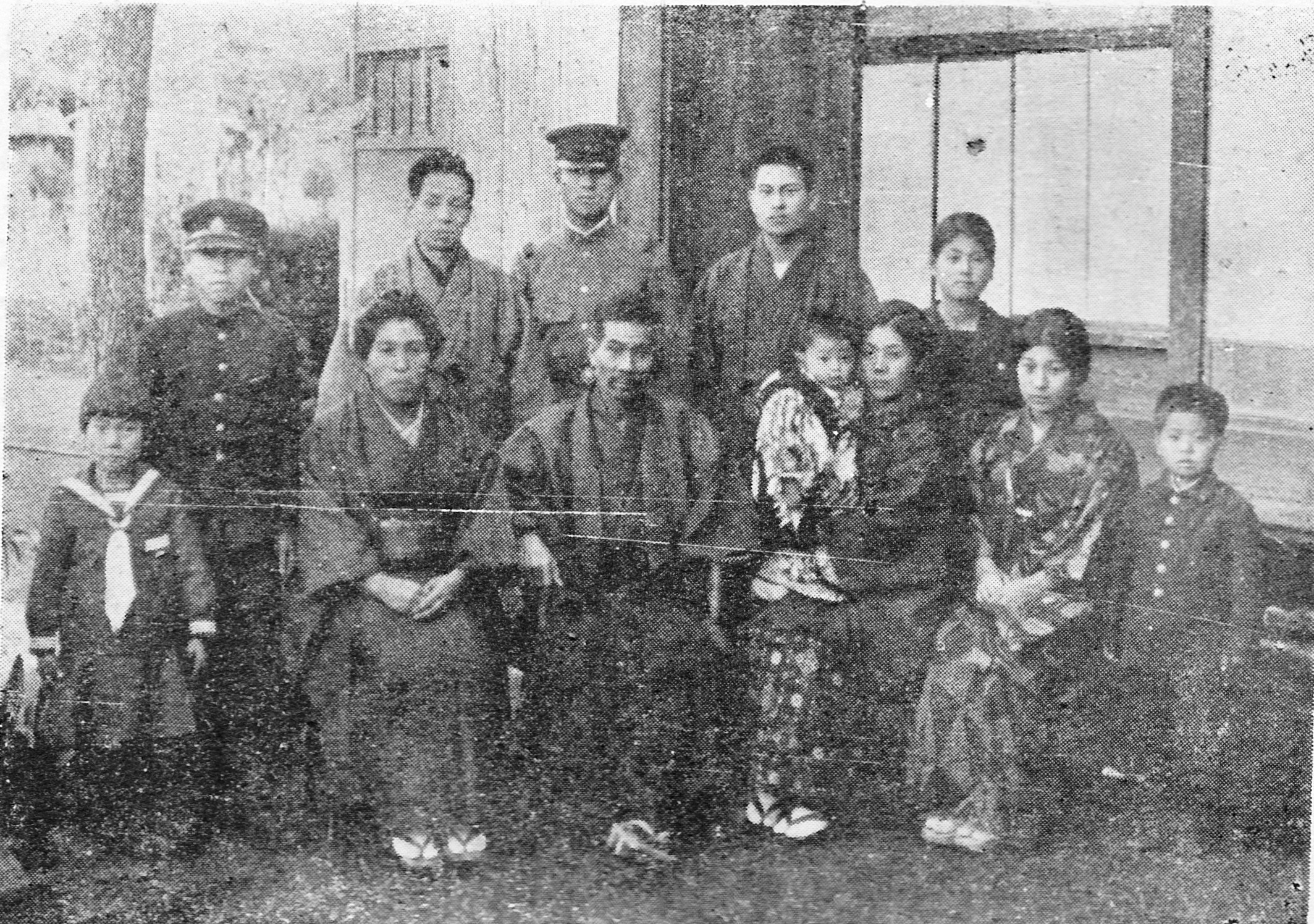 西住と家族。